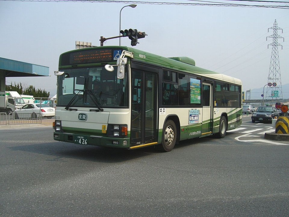 京阪バス 旧・京阪宇治交通ノンステップ車色 京田辺市役所東交差点にて